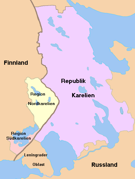 Karelien heute2